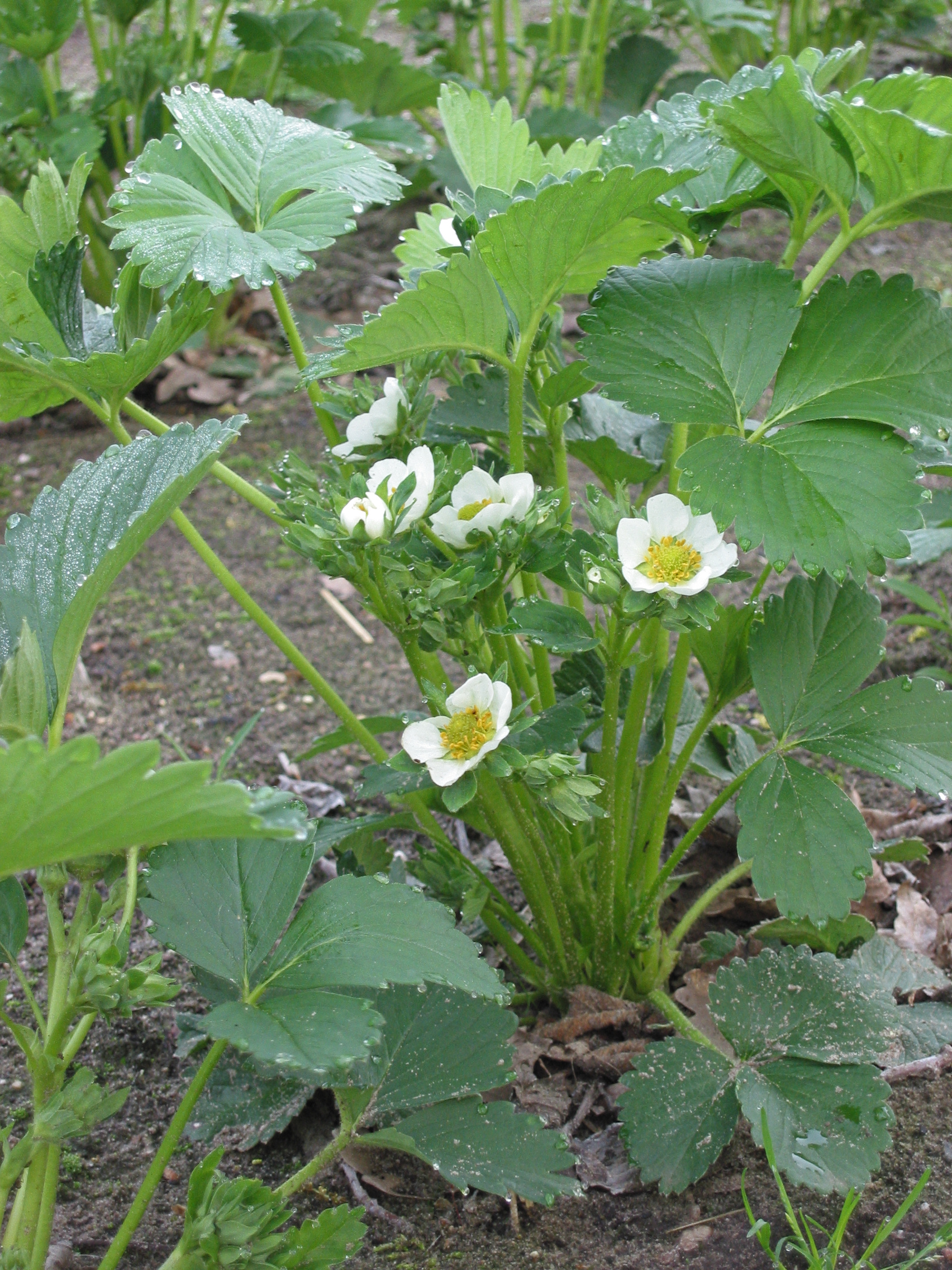 zelfgemaakte foto; aardbeiplant in bloei